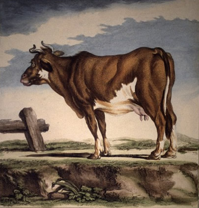 La Vache du Cotentin par Jacques de Seve, dessinateur, et Magd. Th. Rousselet graveur, [Illustrations de Histoire générale des animaux, des végétaux et des minéraux...]. Partie 1, Les Quadrupèdes de la France - pl. 198 Éditeur : chez l'auteur, chez Debure (Paris) Identifiant : ark:/12148/btv1b2300242m